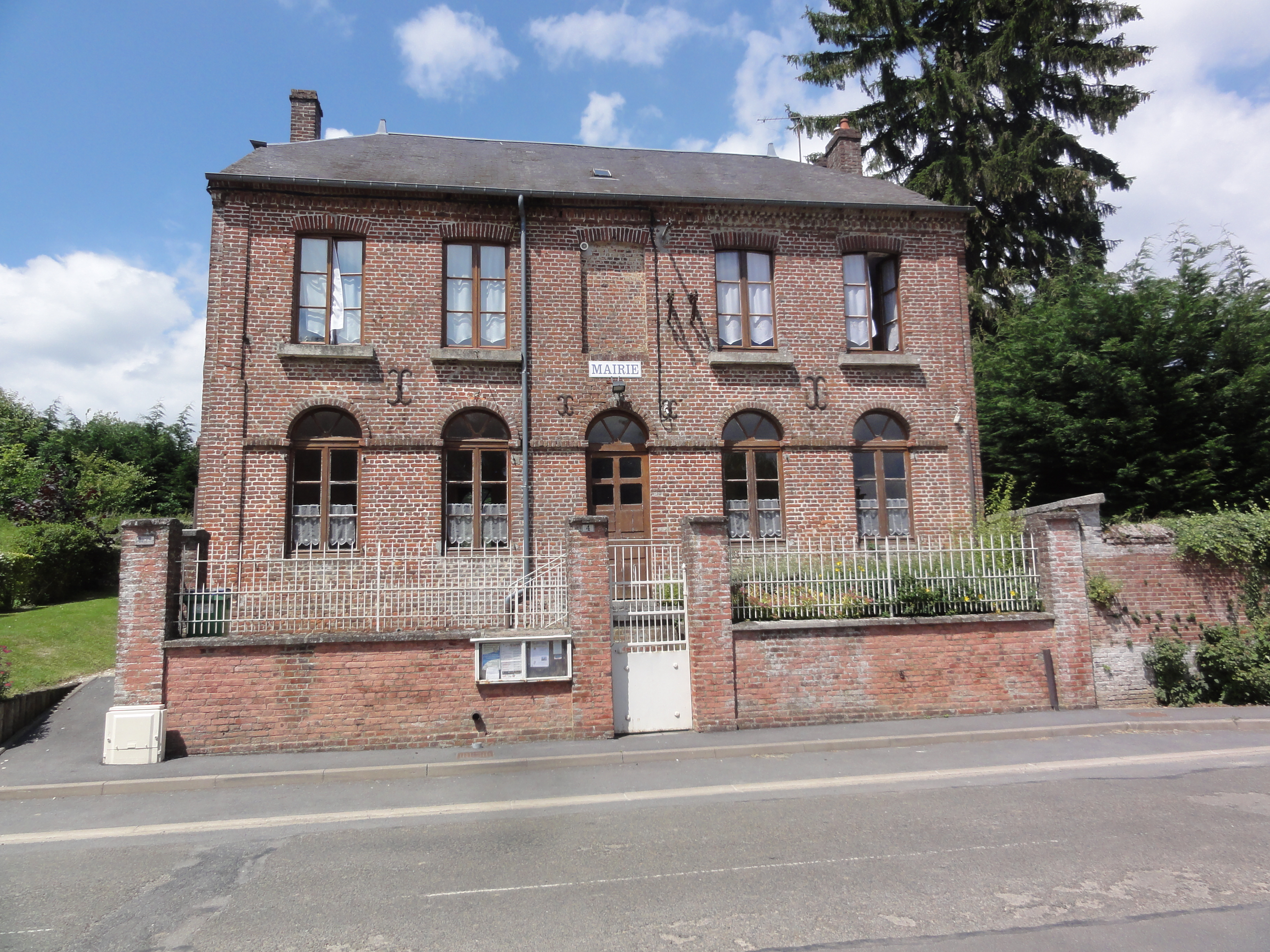 Cuiry-lès-Iviers (Aisne) mairie